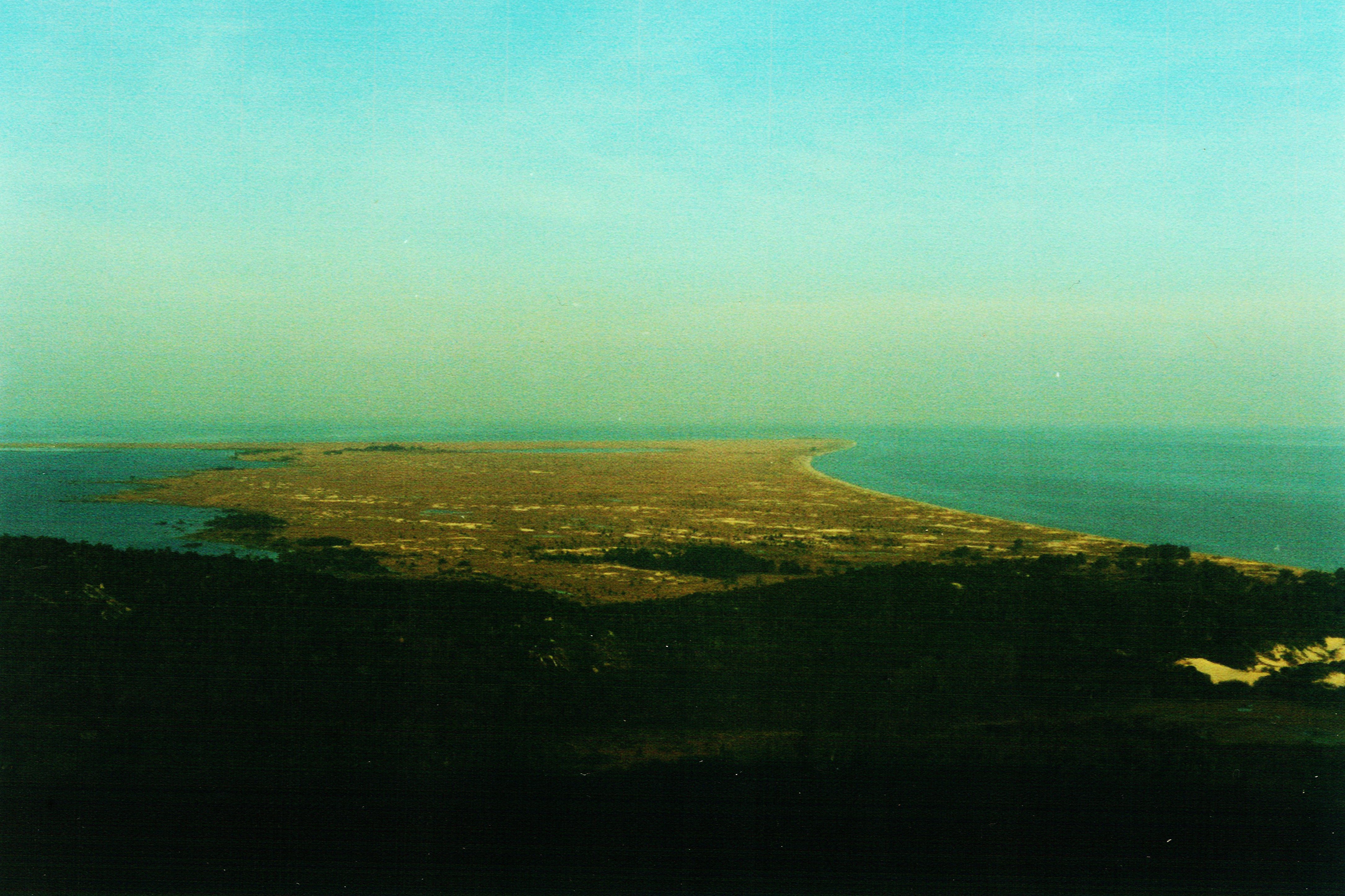 Vista do morro